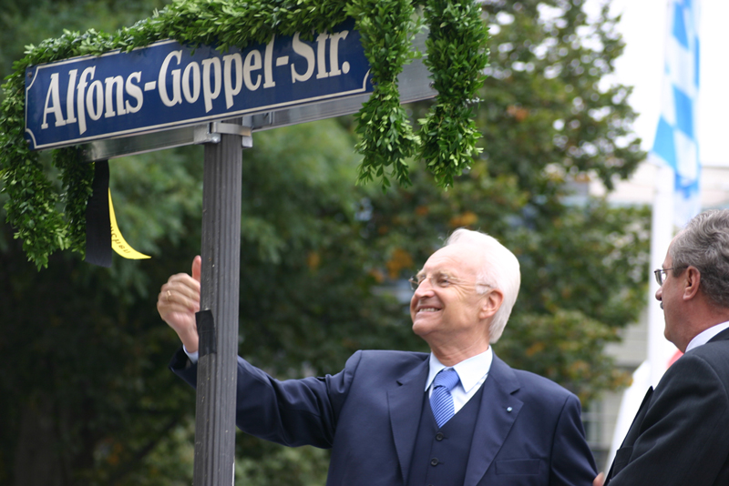 Edmund Stoiber, Bayerischer Ministerpräsident, am 1.10.2005 unmittelbar nach der Umbenennung der Straße vor dem Marstallplatz in München in Alfons-Goppel-Straße. Mit auf dem Bild: Der Oberbürgermeister von München, Christian Ude.